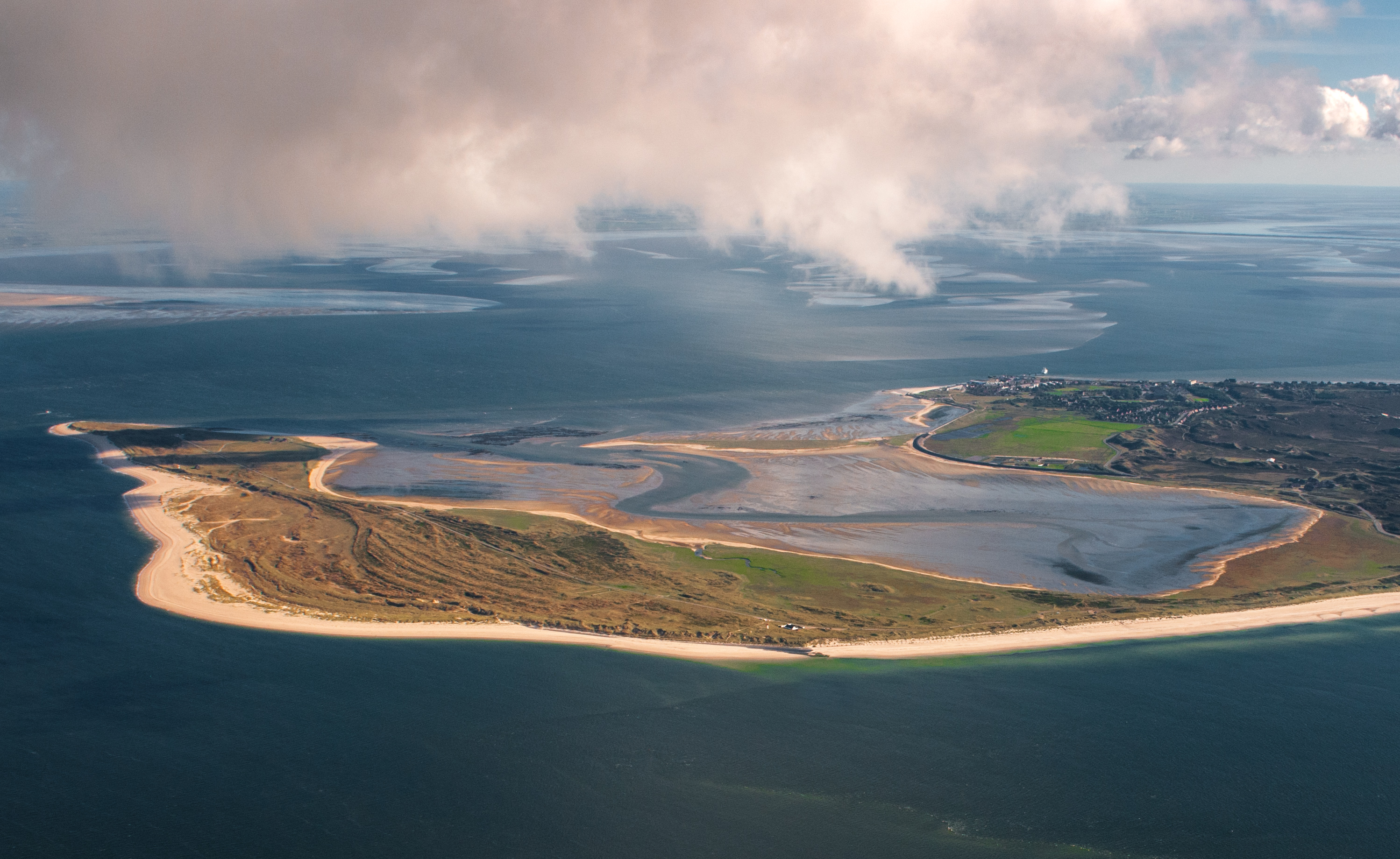 Fotoflug über das nordfriesische Wattenmeer